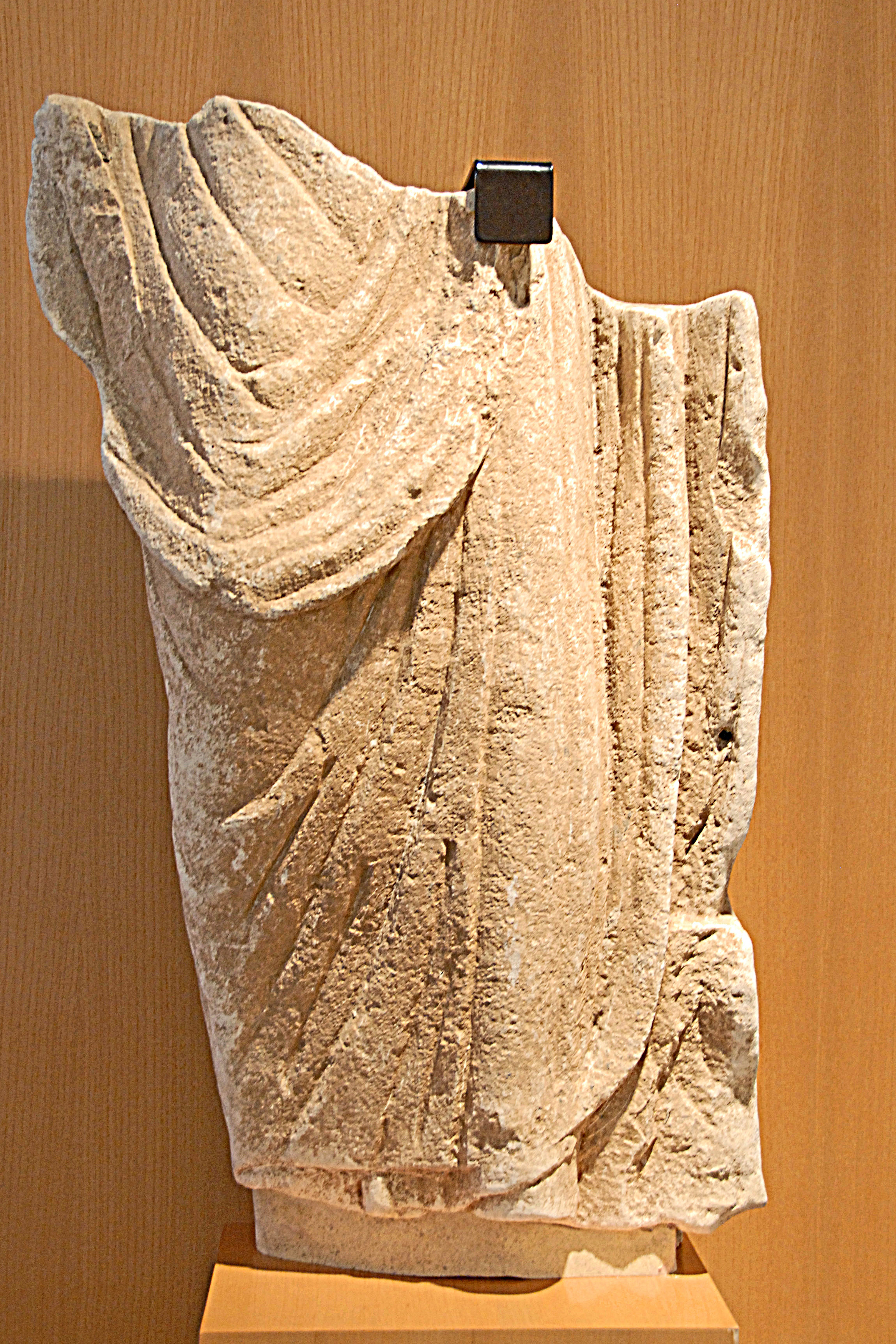 Civaux, Museum, röm. Skulptur, kopflos